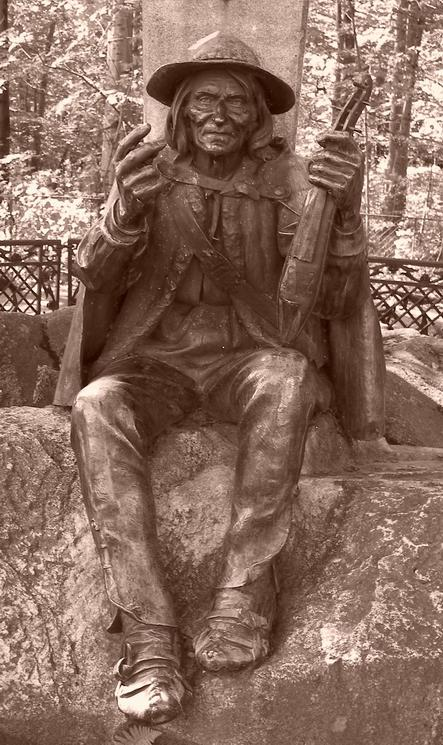 Monument of Jan Krzeptowski (Sabała) in Zakopane